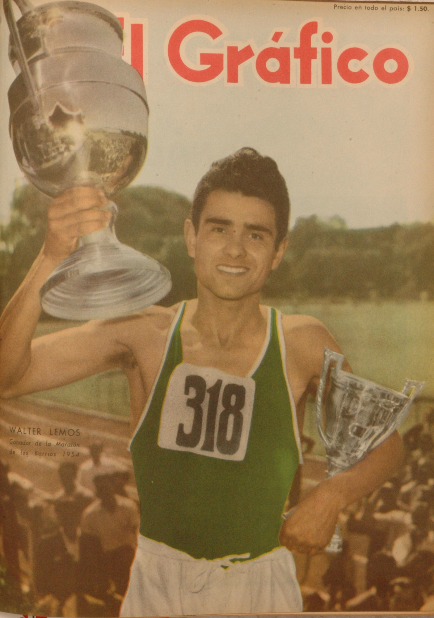 El Grafico del 17 de Diciembre de 1954. Edicion 1845